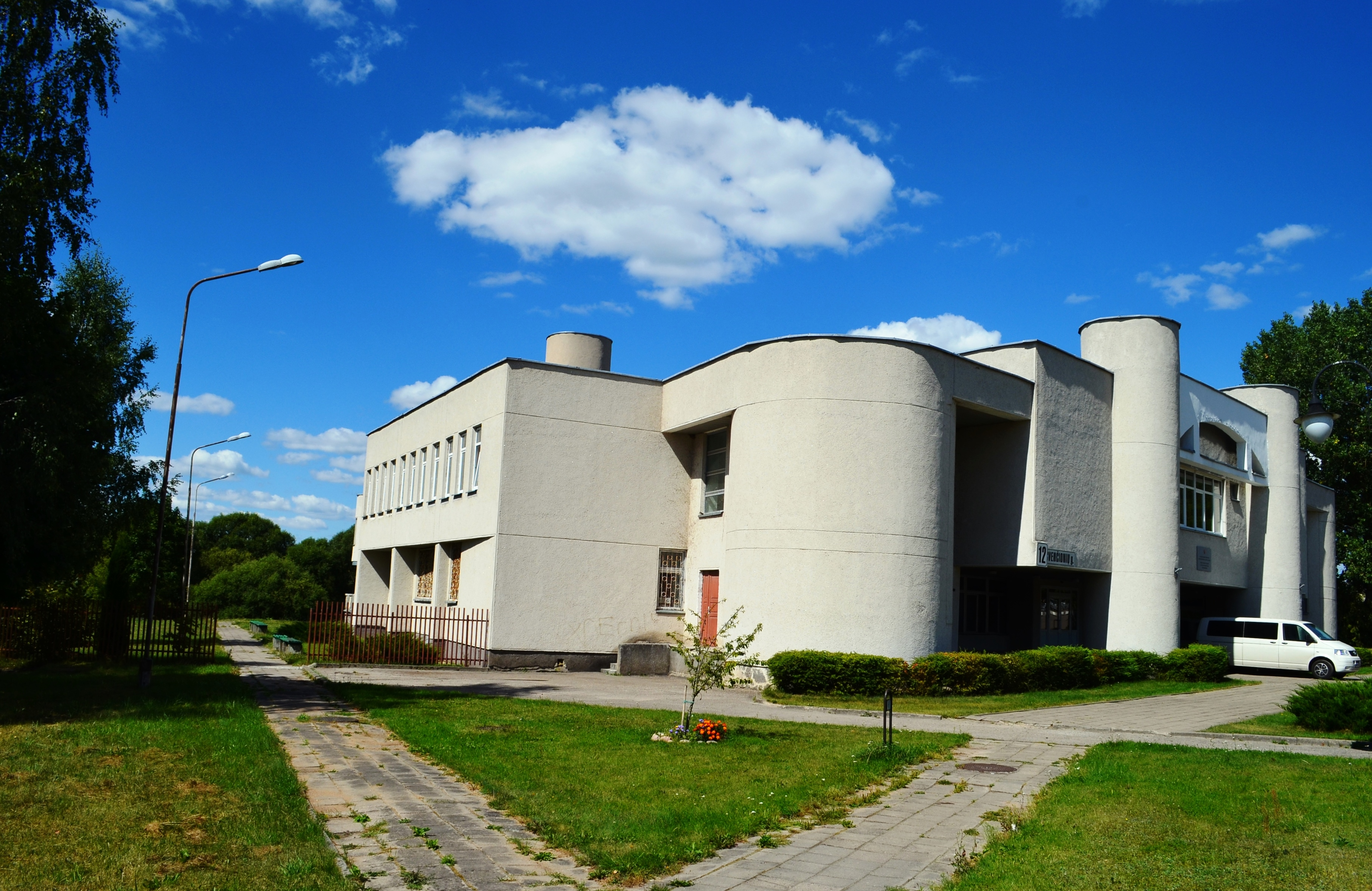 Nemenčinės daugiafunkcinis kultūros centras, Vilniaus raj.